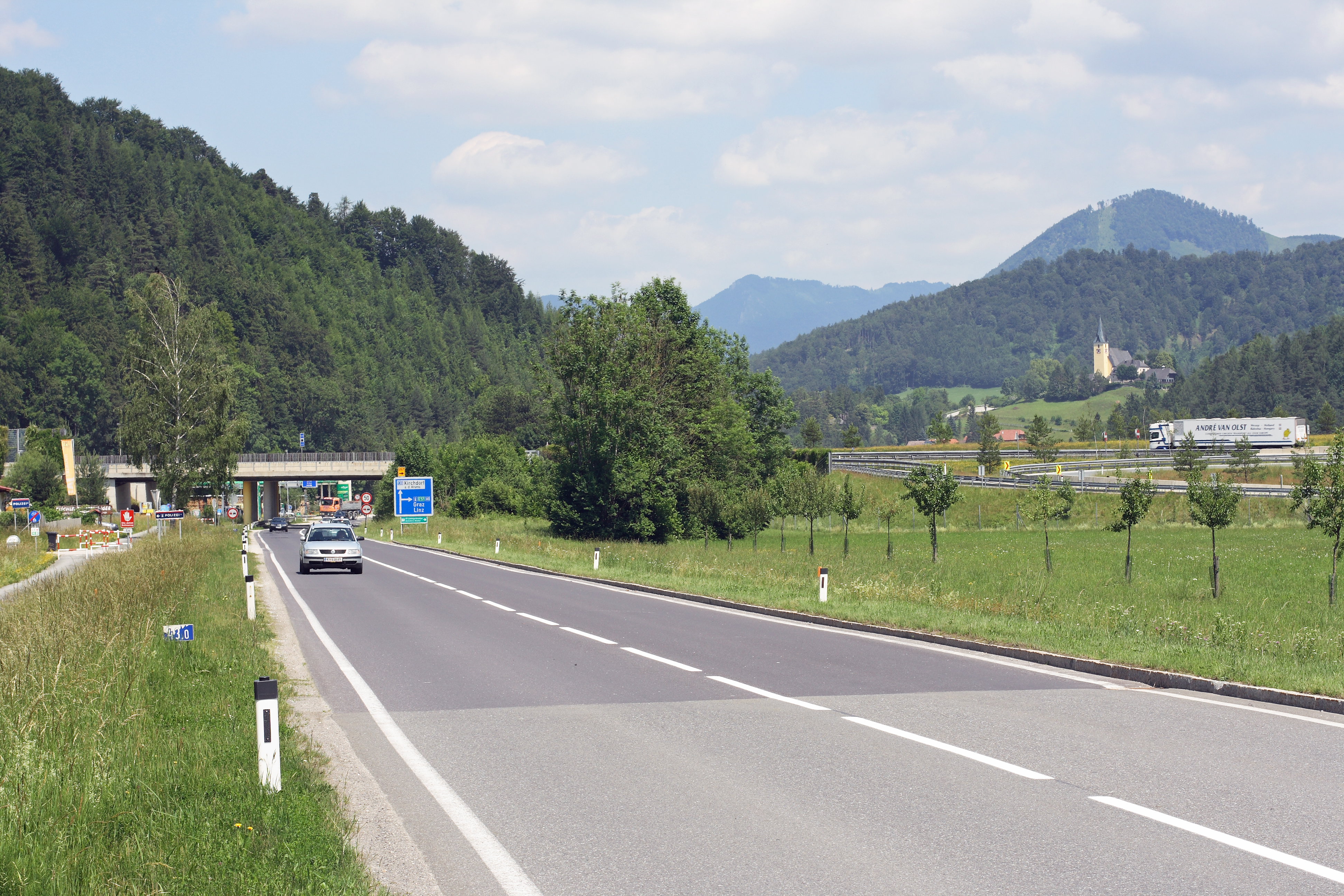 Die Pyhrnpass Straße in Klaus, kurz nach der Einmündung der Steyrtal Straße. Links verläuft der Steyrtalradweg, im Mittelgrund quert die Pyhrn Autobahn. Rechts im Hintergrund steht auf einem Bergkegel die Wallfahrtskirche Frauenstein